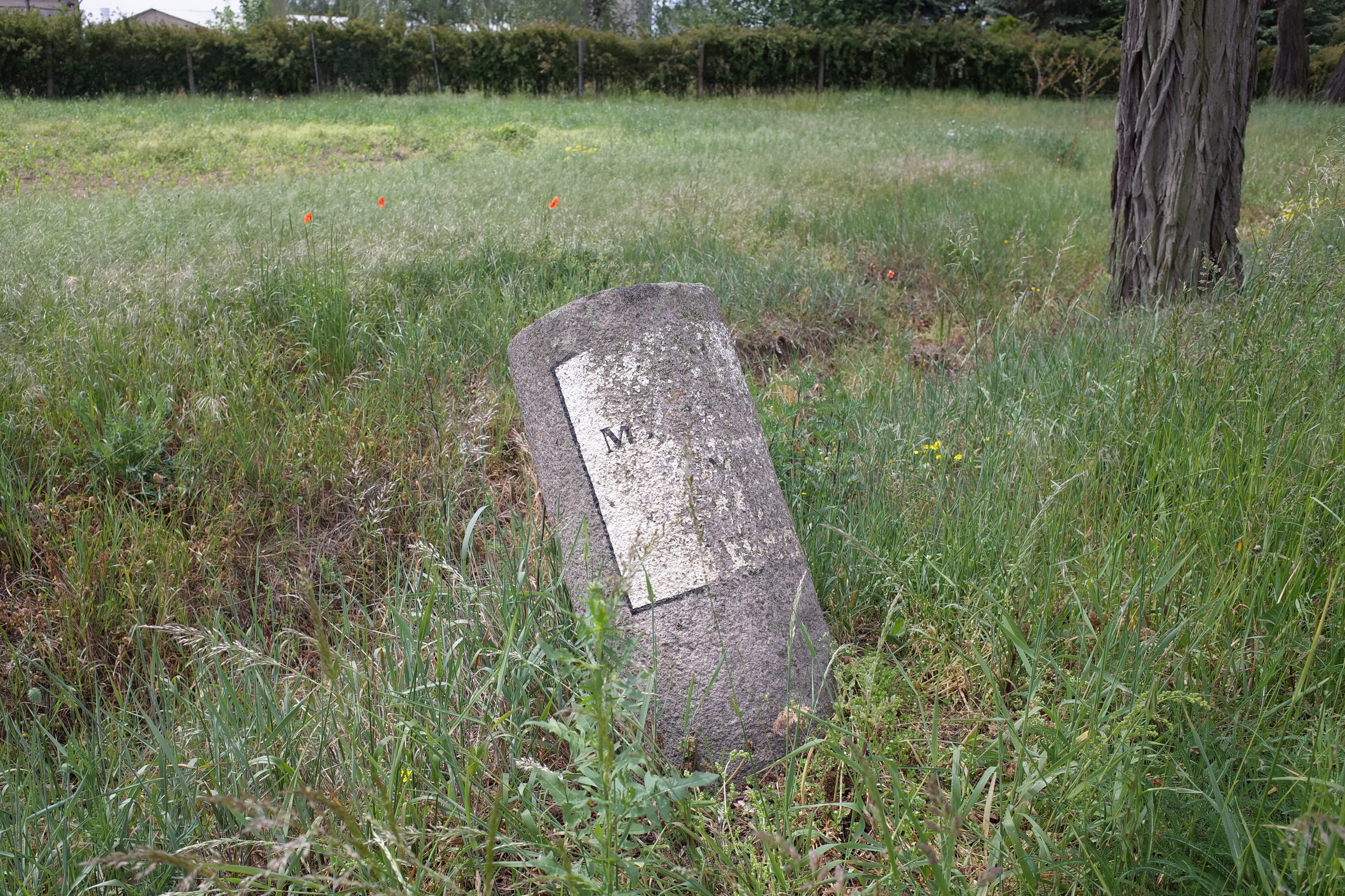 Stadt Zerbst (Anhalt), Ortsteil Reuden/Anhalt, Meilenstein. 2 Myriameter von Zerbst.